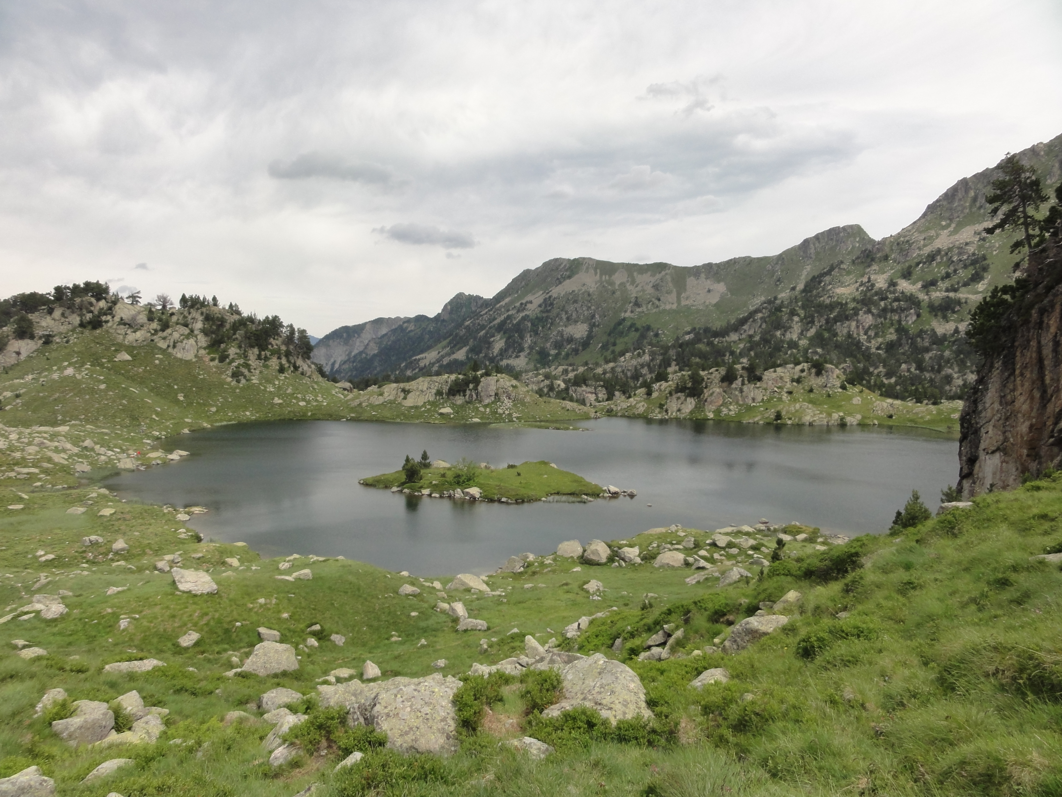 Circ de Colomèrs: estanh Plan This is a a photo of a natural area in Catalonia, Spain, with id: ES510081